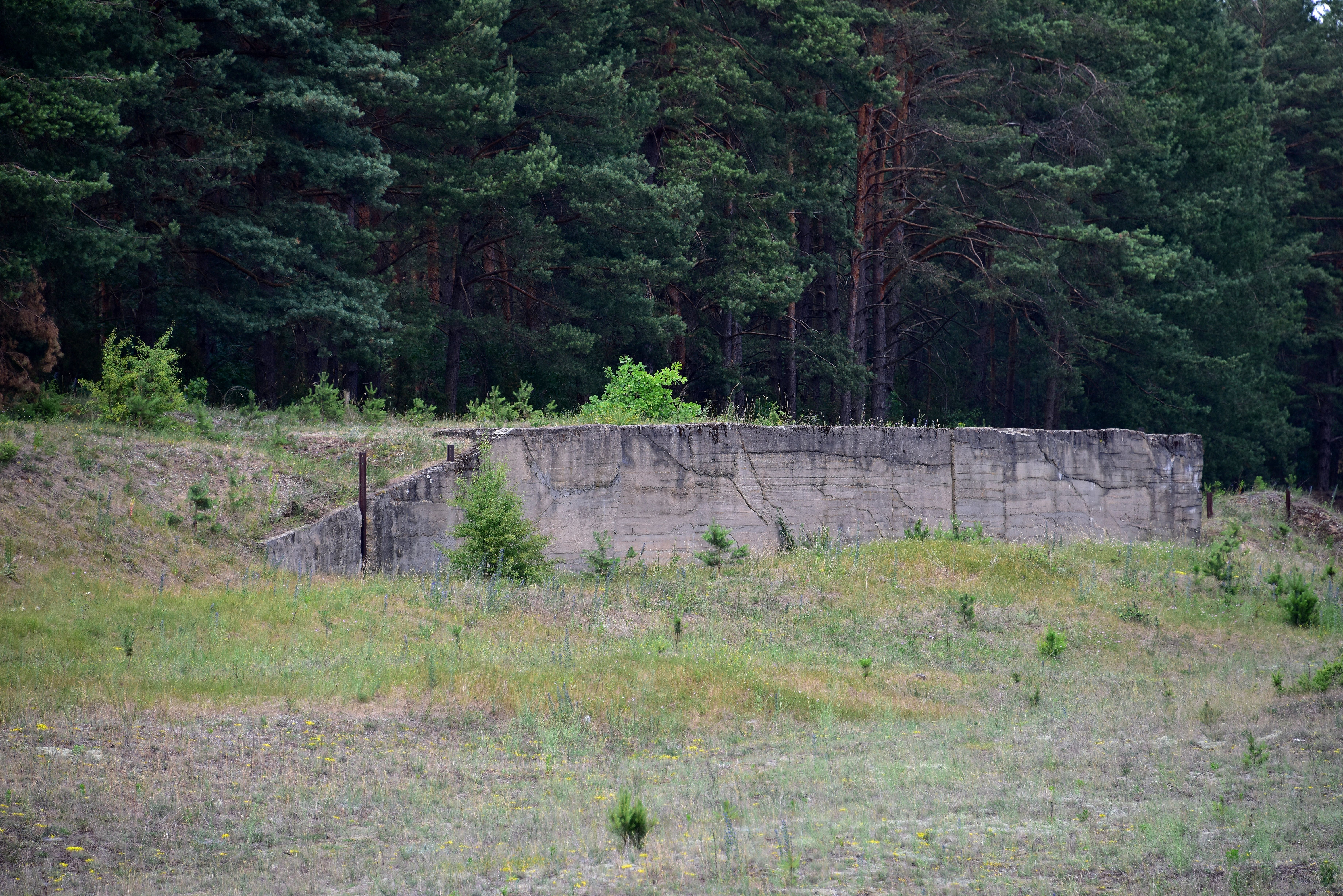 Dawna żwirownia w pobliżu karnego obozu pracy w Treblince. Pozostałości rampy kolejowej